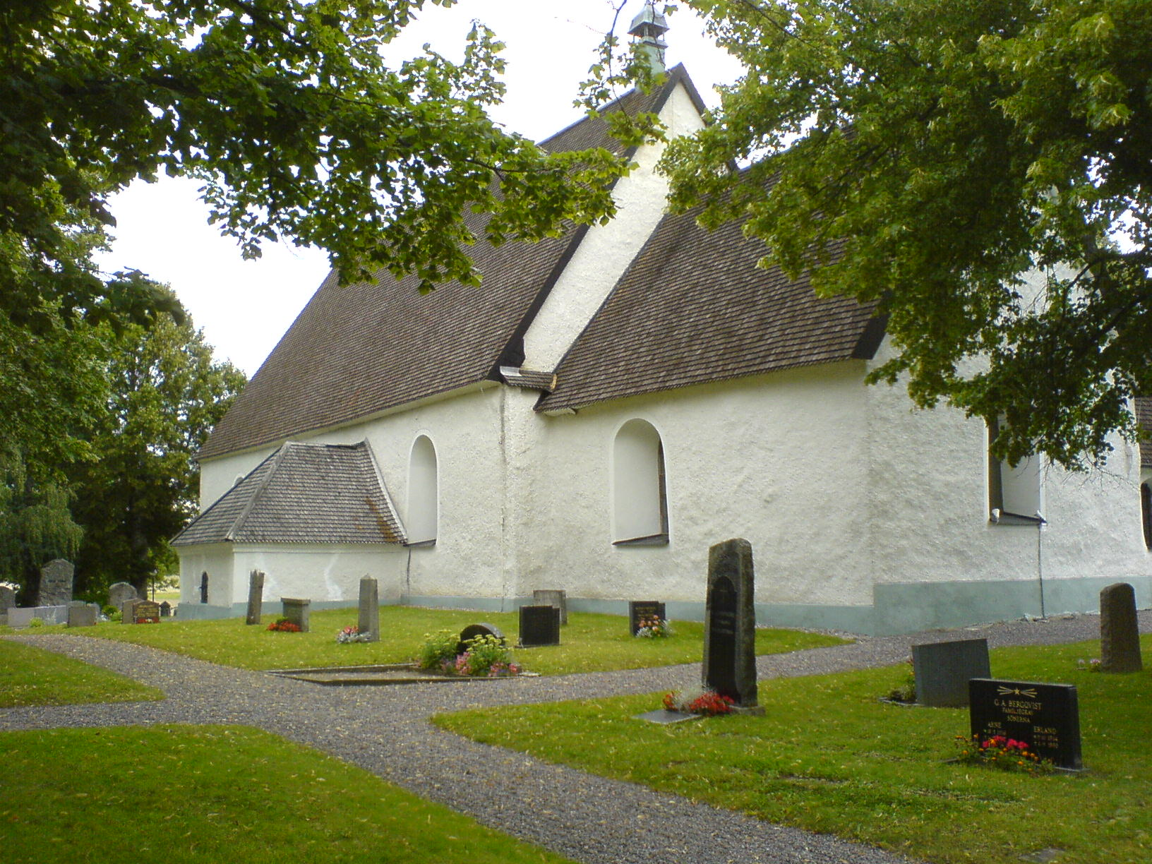 Löts kyrka, sett från söder.